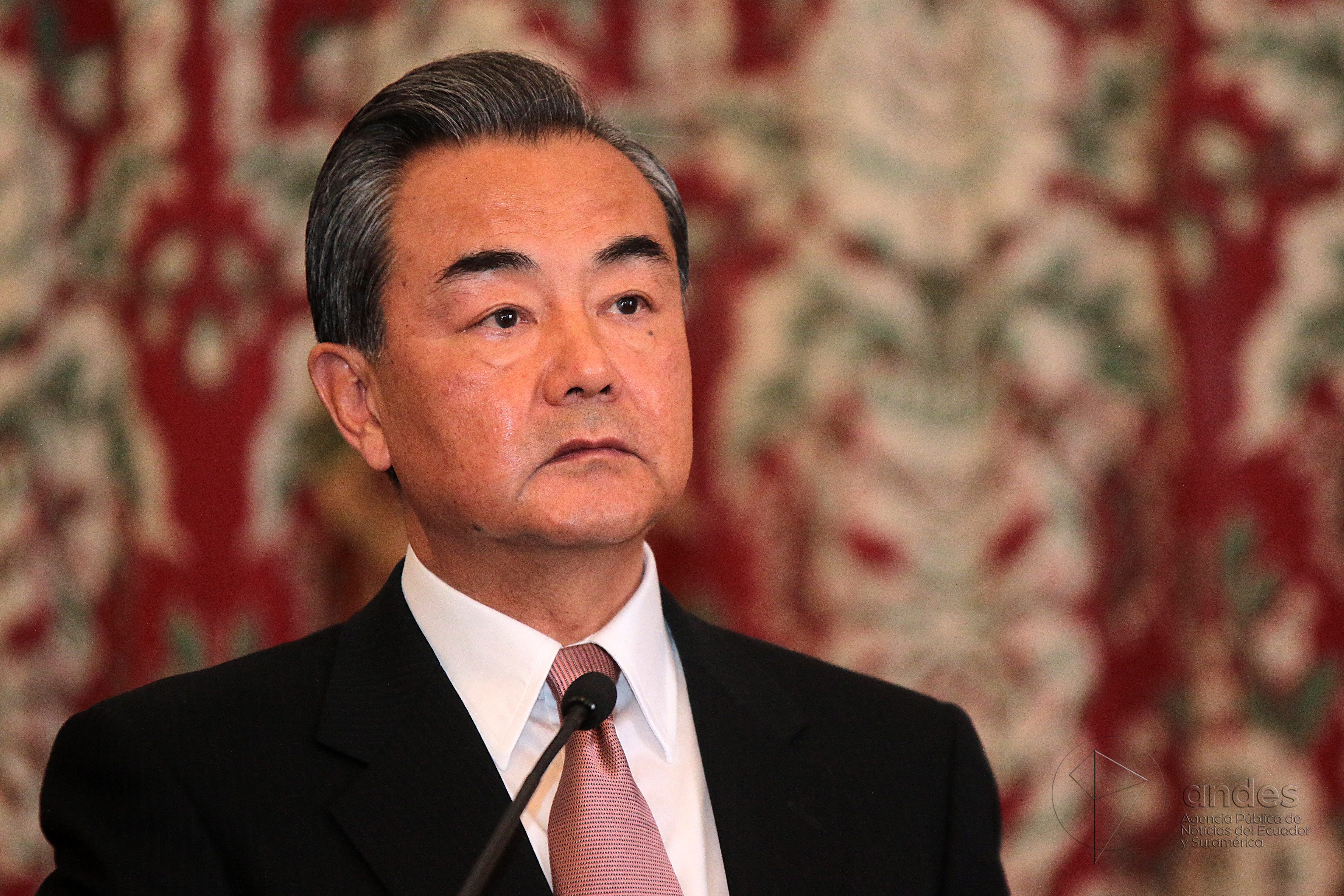 Quito, 04 de Oct (Andes).- Los cancilleres Guillaume Long (Ecuador) y Wang Yi (China) mantuvieron fructíferas reuniones de gabinete en donde discutieron temas de interés común entre ambas naciones. Además se anunció la visita de Xi Jinping. fotografías: Carlos Rodríguez/Andes.